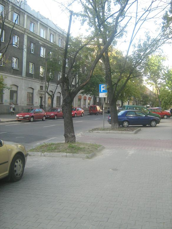 Ulica Płocka w Warszawie